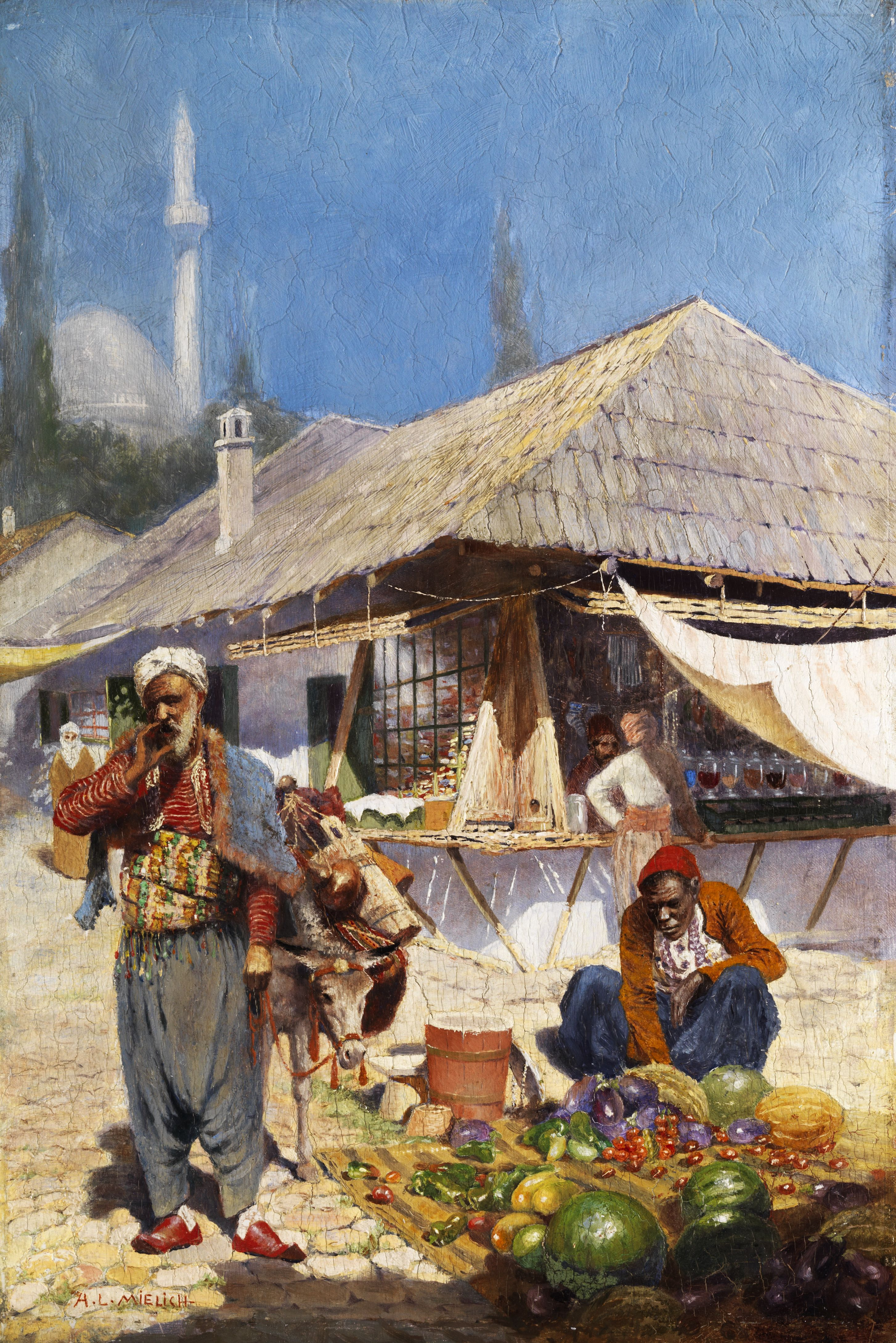 Orientalische Marktszene.